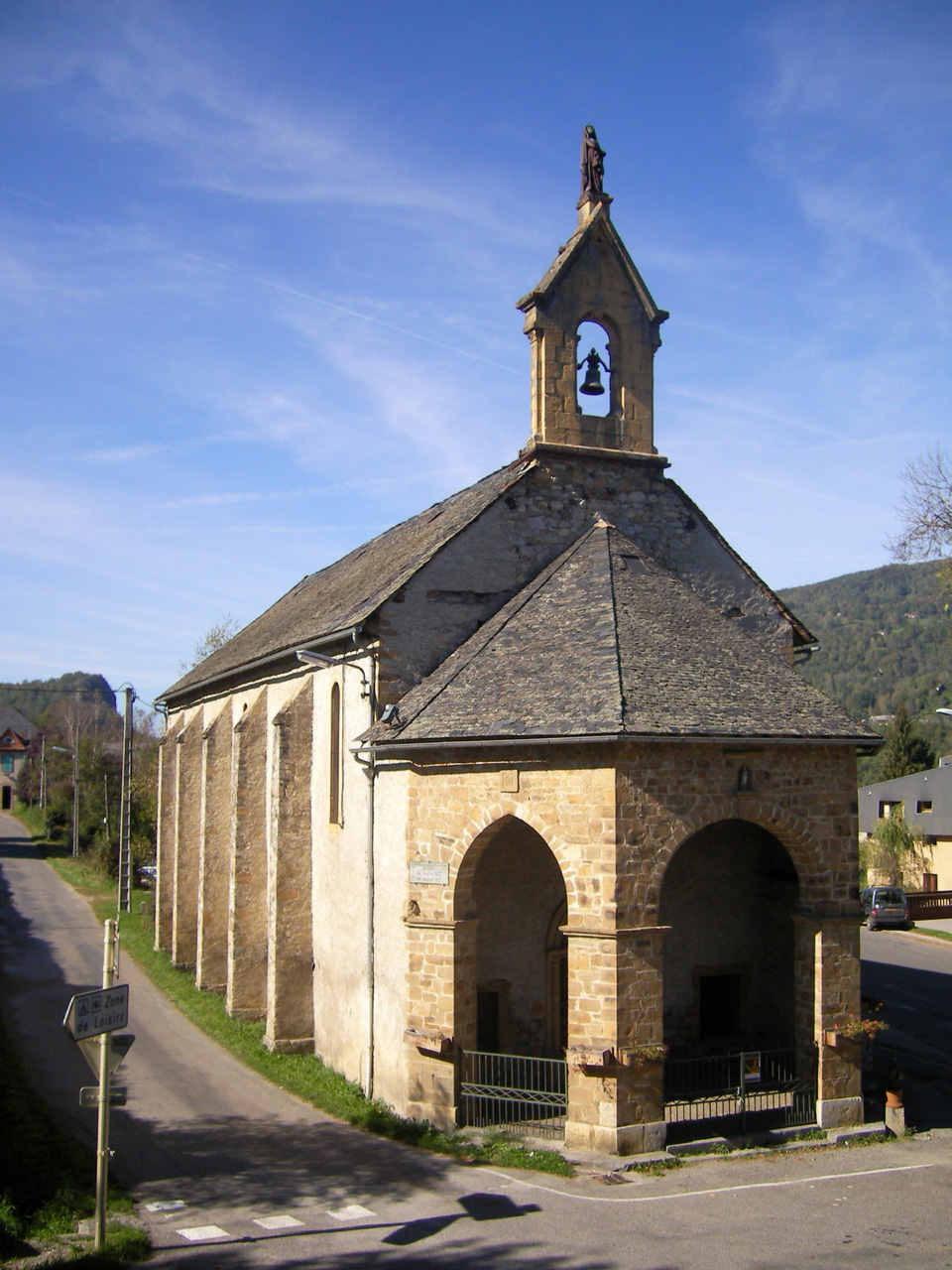 Chapelle de l'Ave Maria de Massat (Ariège, Midi-Pyrénées, France).